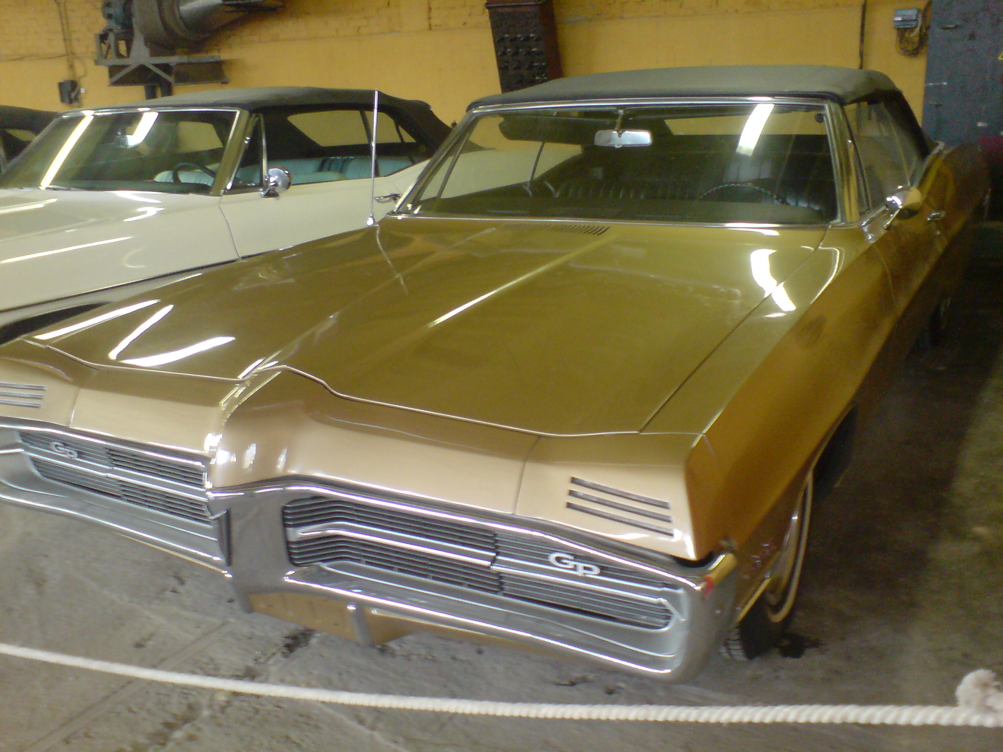 1967 Pontiac Grand Prix